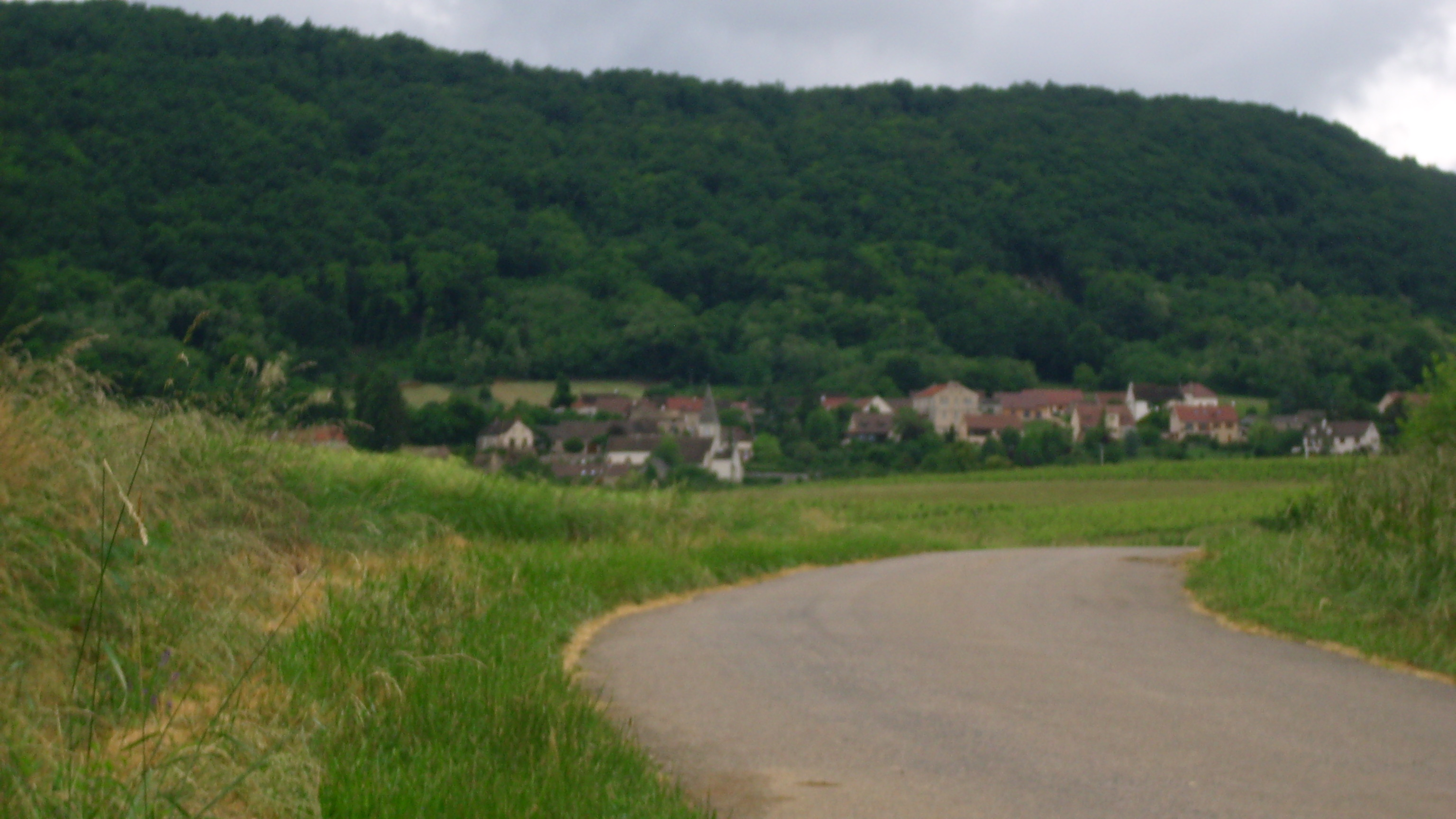 Vue d'une partie du centre de Saint-Mard-de-Vaux (71)